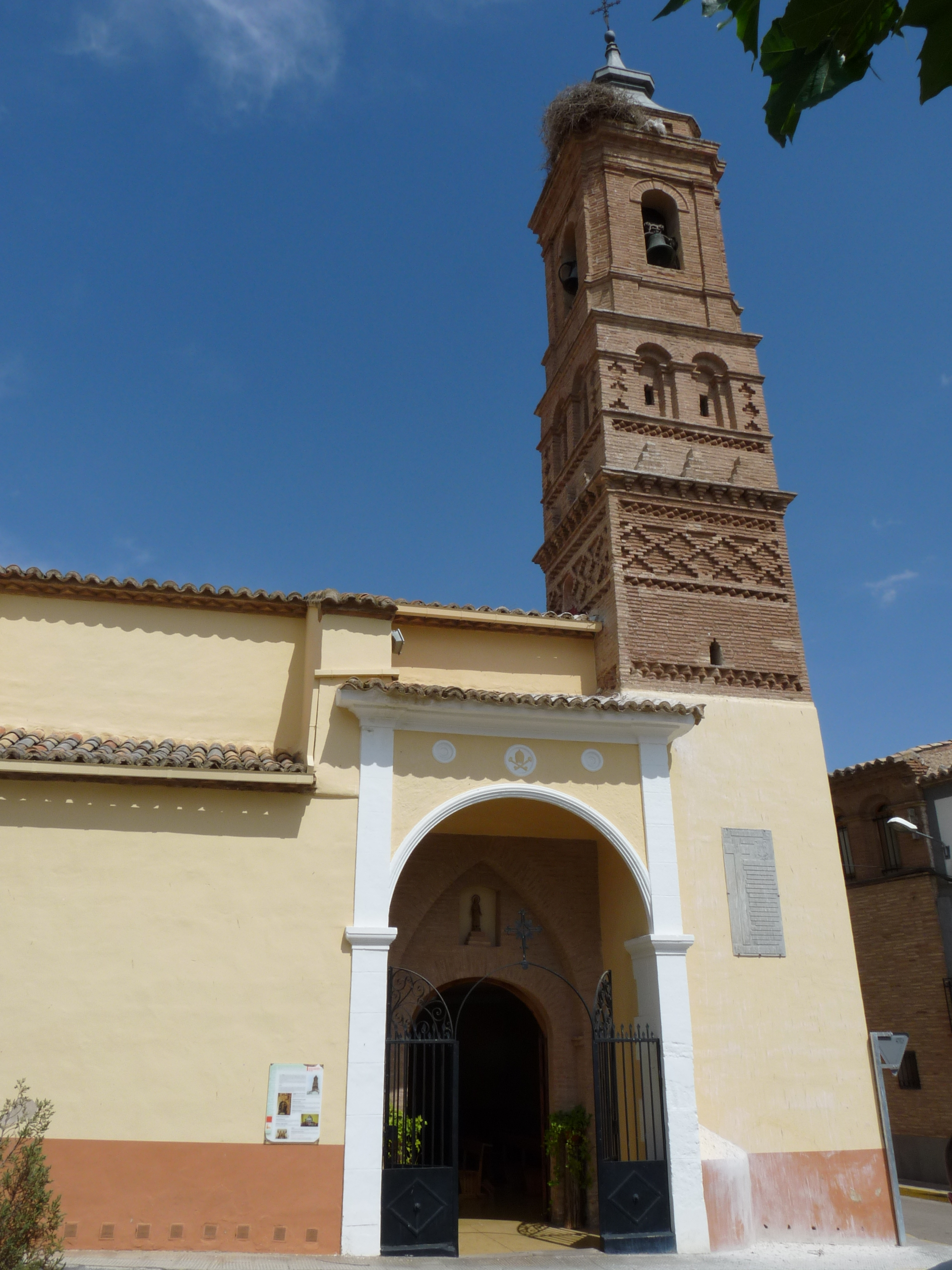 Lumpiaque - Iglesia de San Francisco de Asís s. XVI-XVIII - Fachada